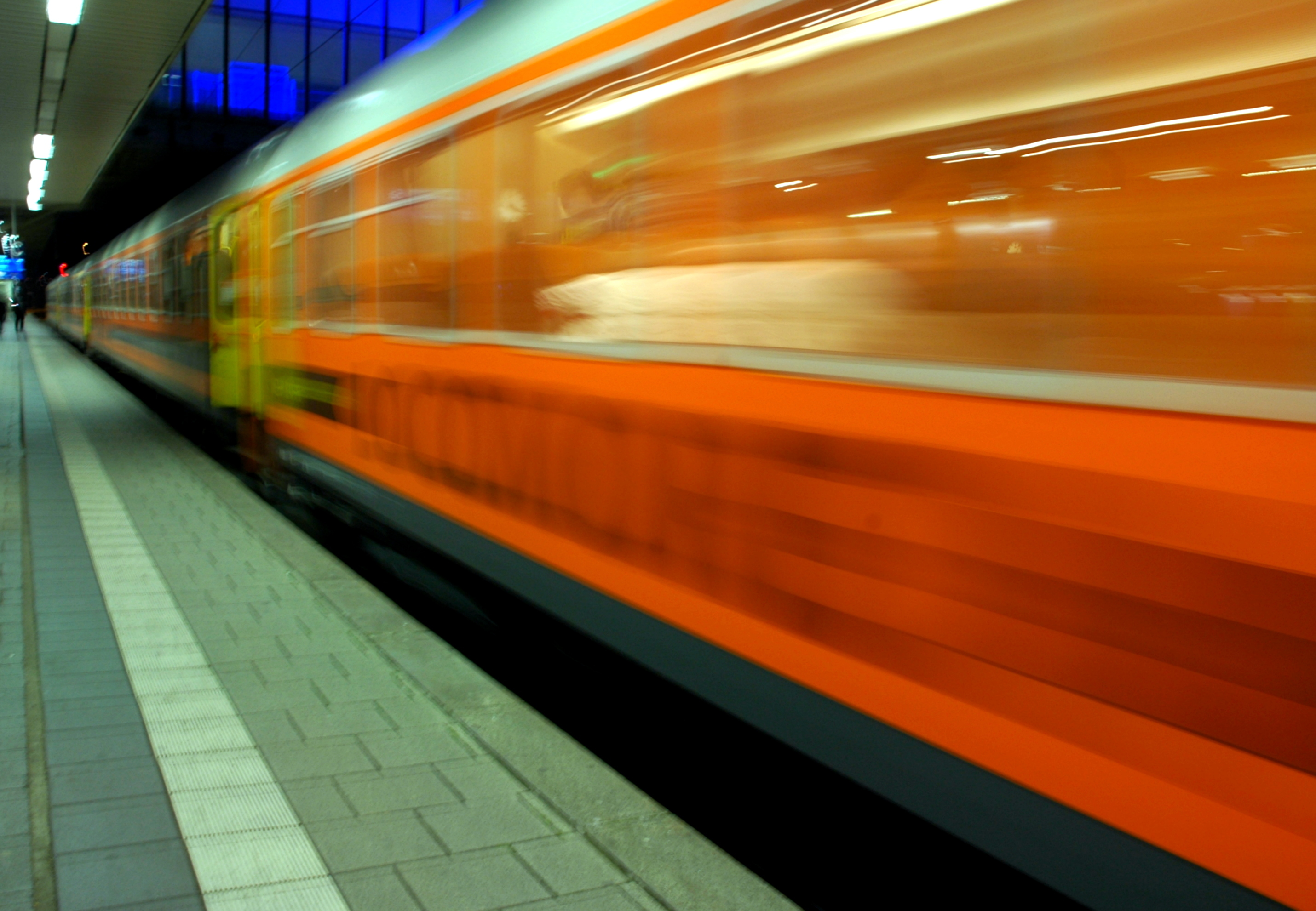 Heidelberg - Locomore - Premierenfahrt am 14 Dezember 2016